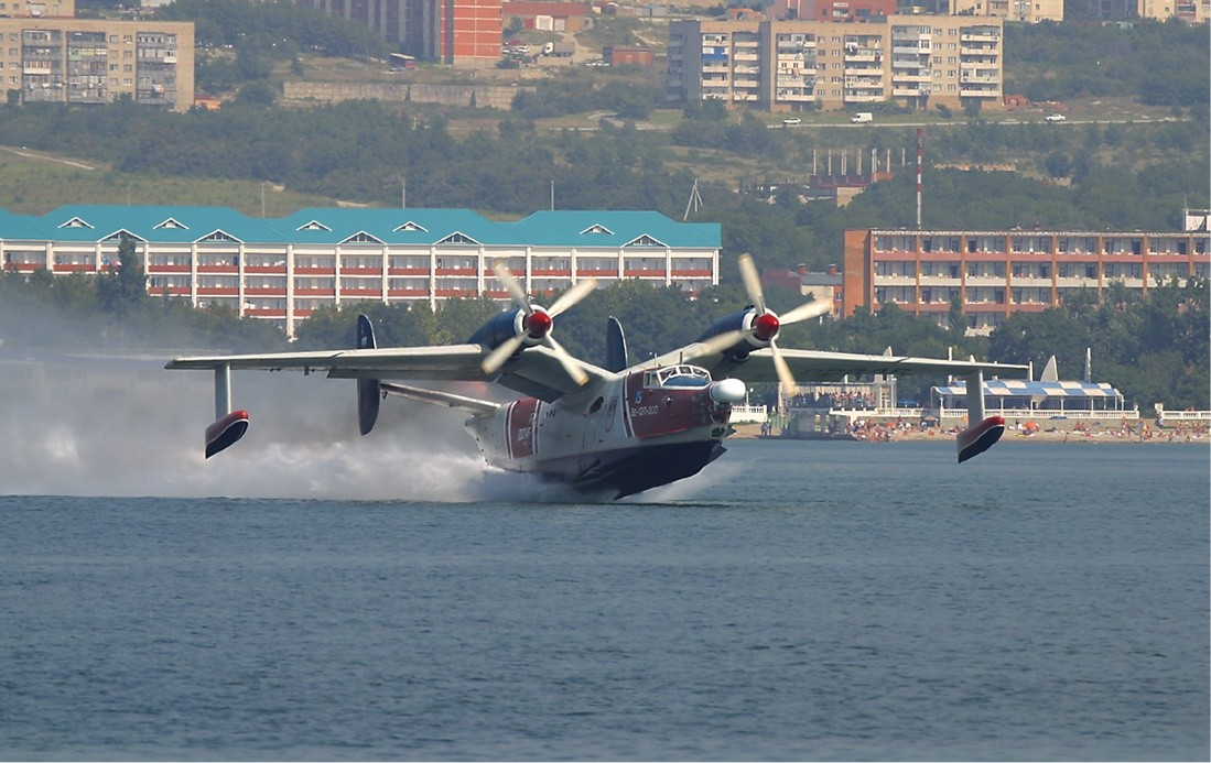 Beriev Be-12P-200 at Gelendzhik, 2 September 2004